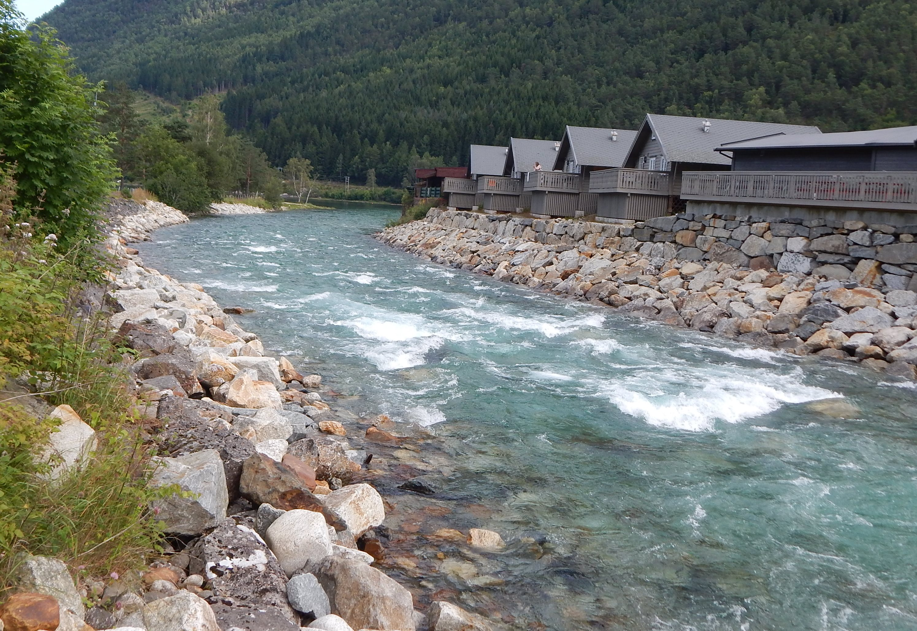 Kinso ved Kinsarvik